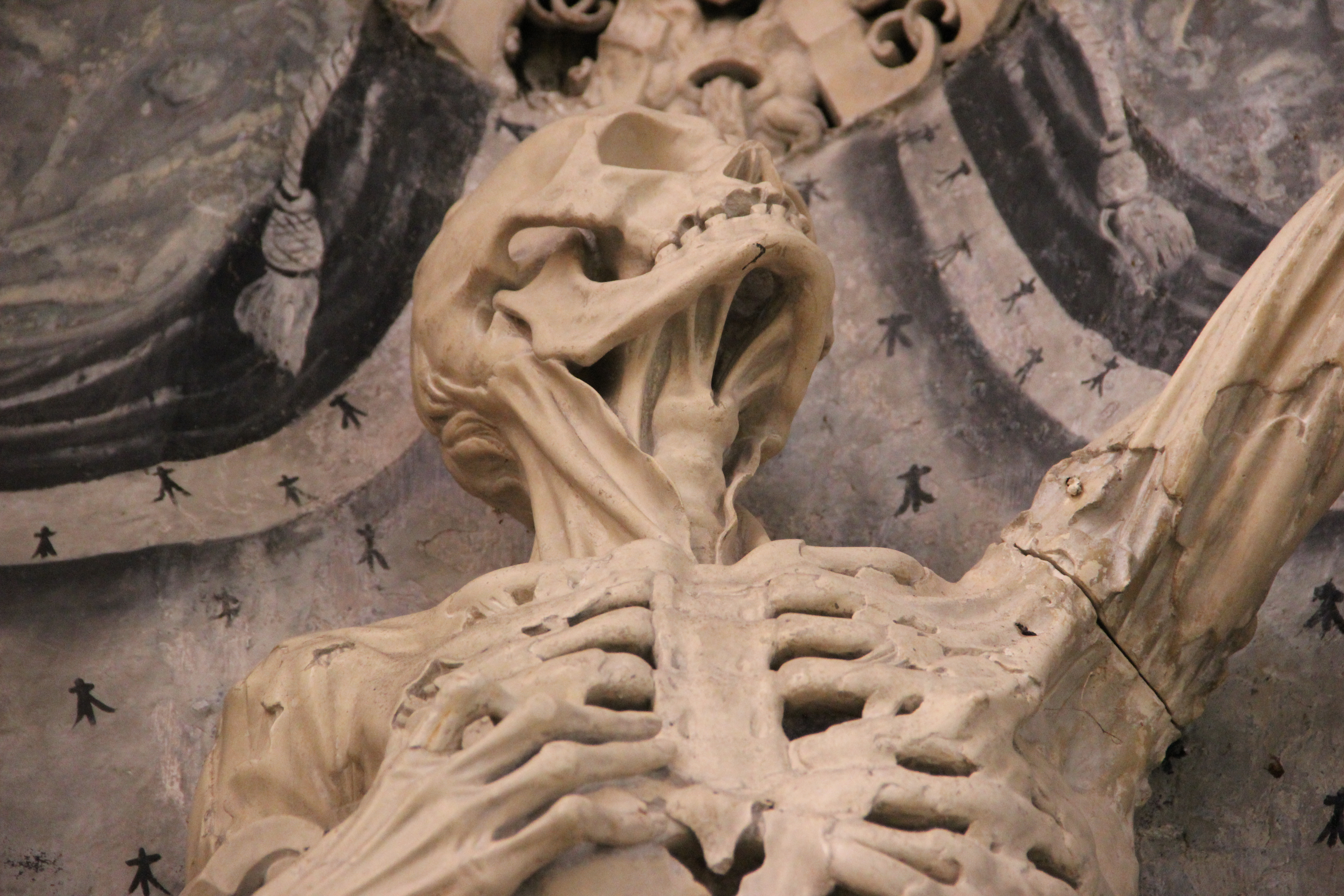 Transi de René de Chalon dans l'église Saint-Etienne de Bar-le-Duc.